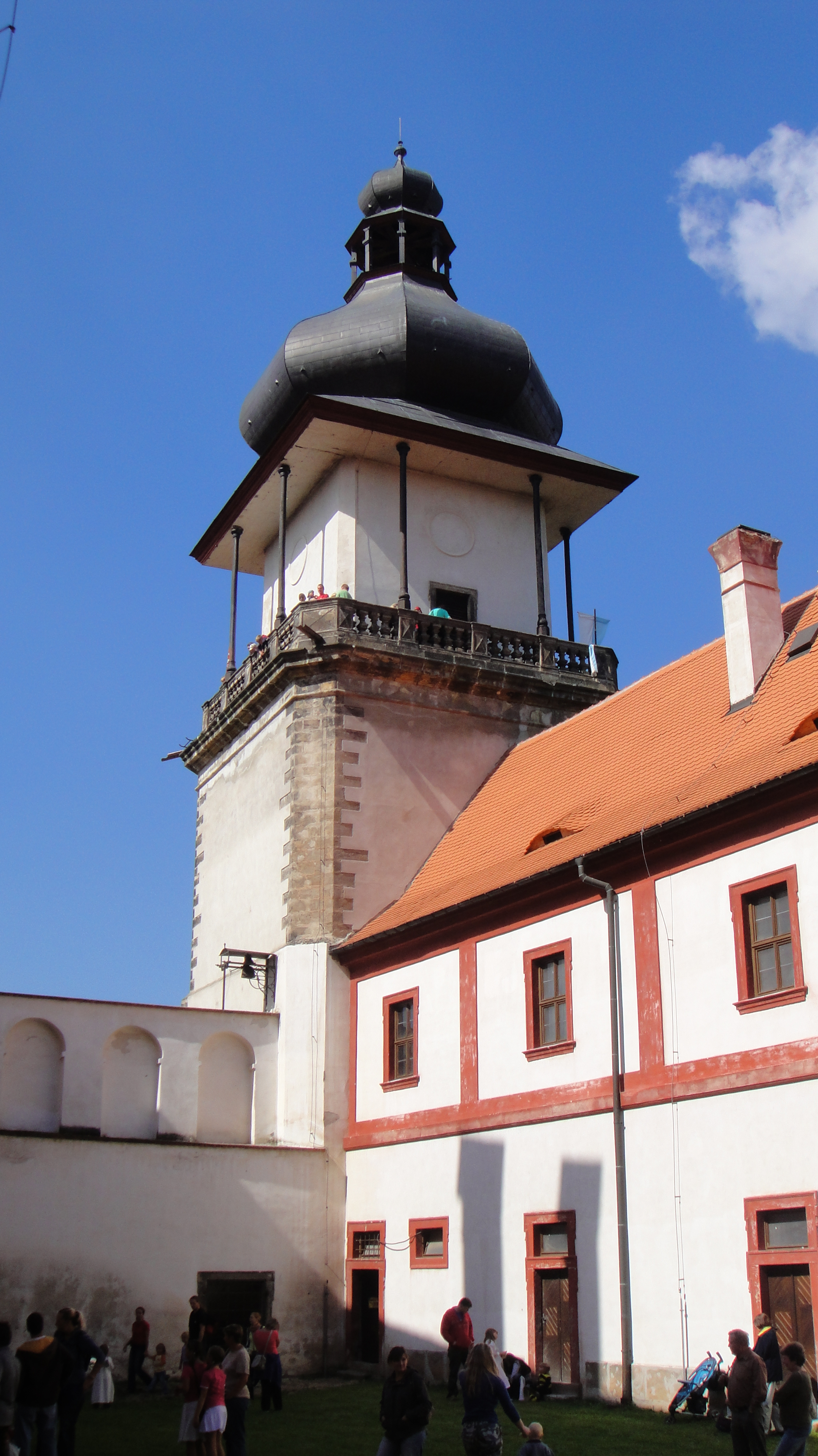 Pohled ze třetího nádvoří na věž.